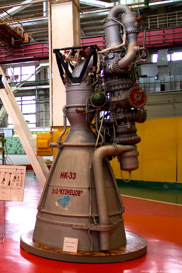 Ракетный двигатель НК-33, АО "Кузнецов", Самара, Россия